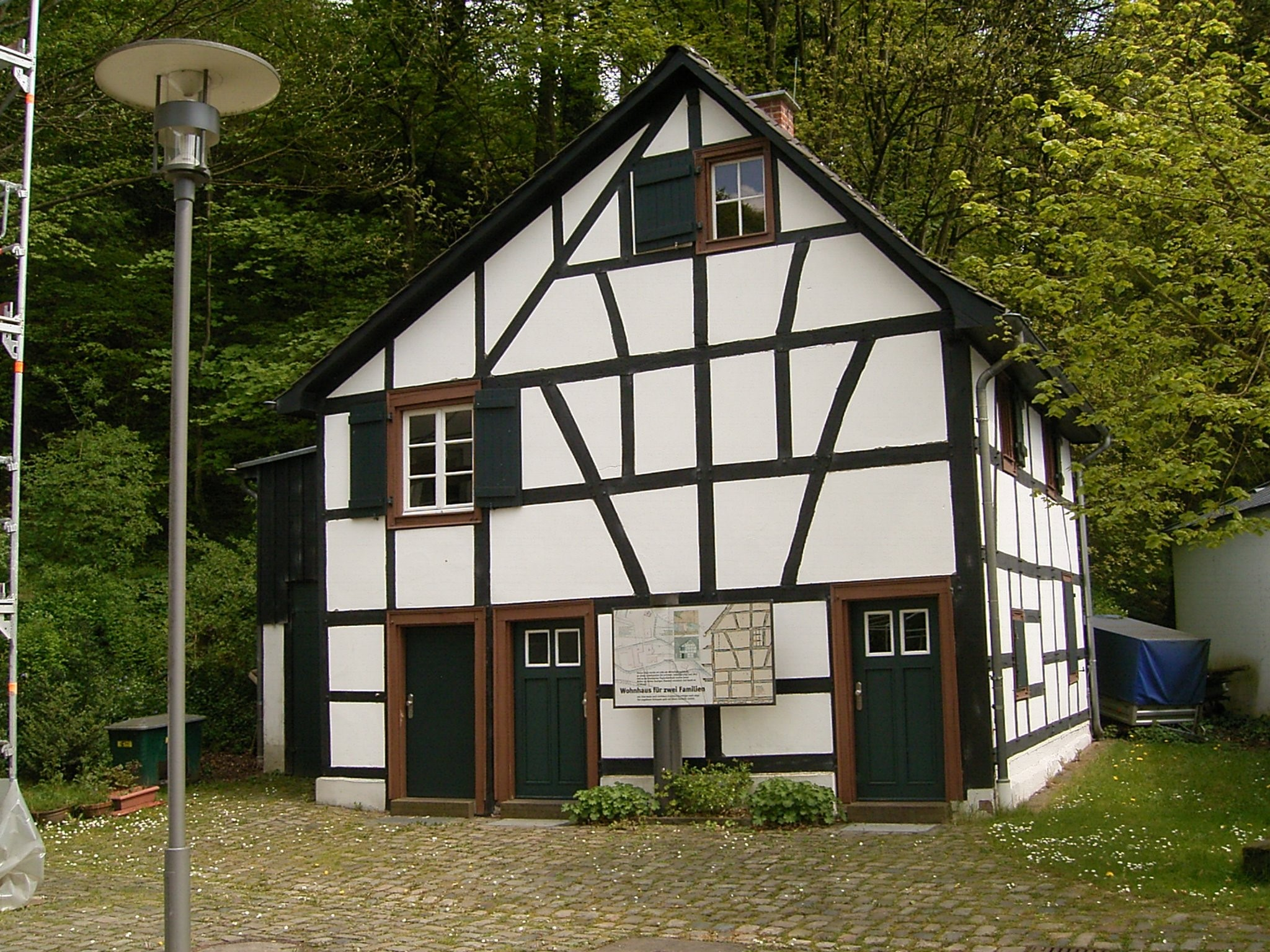 Papiermühle Alte Dombach in Bergisch Gladbach